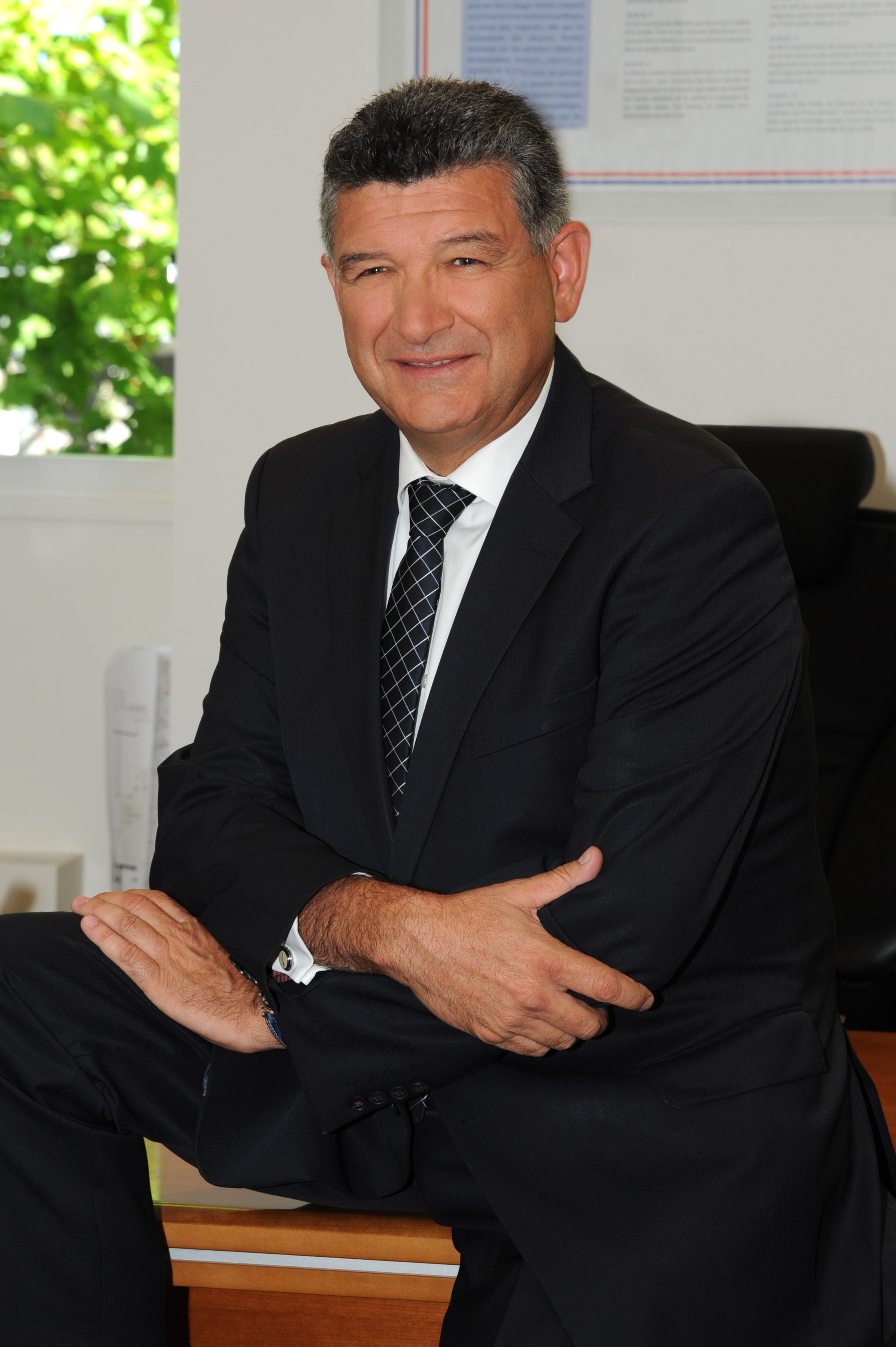 Luc Bouard (1961) maire de 2014 à aujourd'hui.